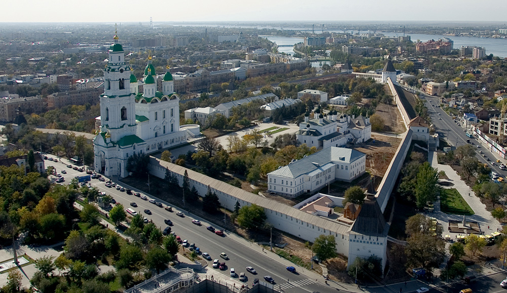 Астраханский кремль с высоты птичьего полета